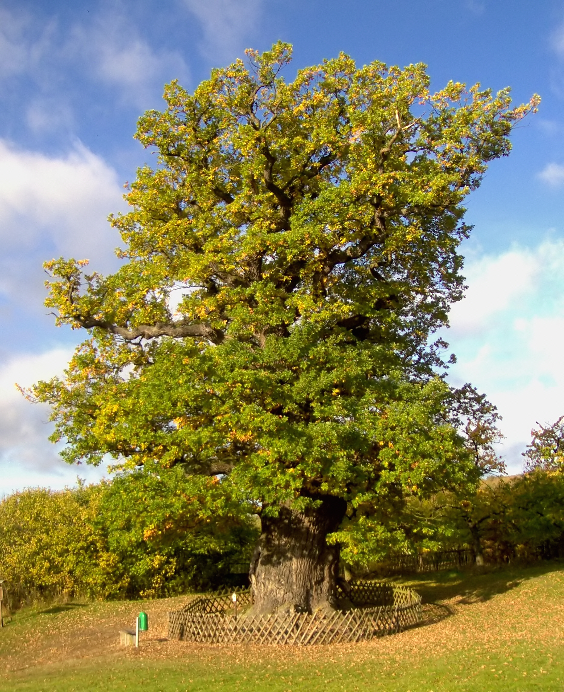 Volkenrodaer Königseiche am 20. Oktober 2006. *Eigene Fotografie.